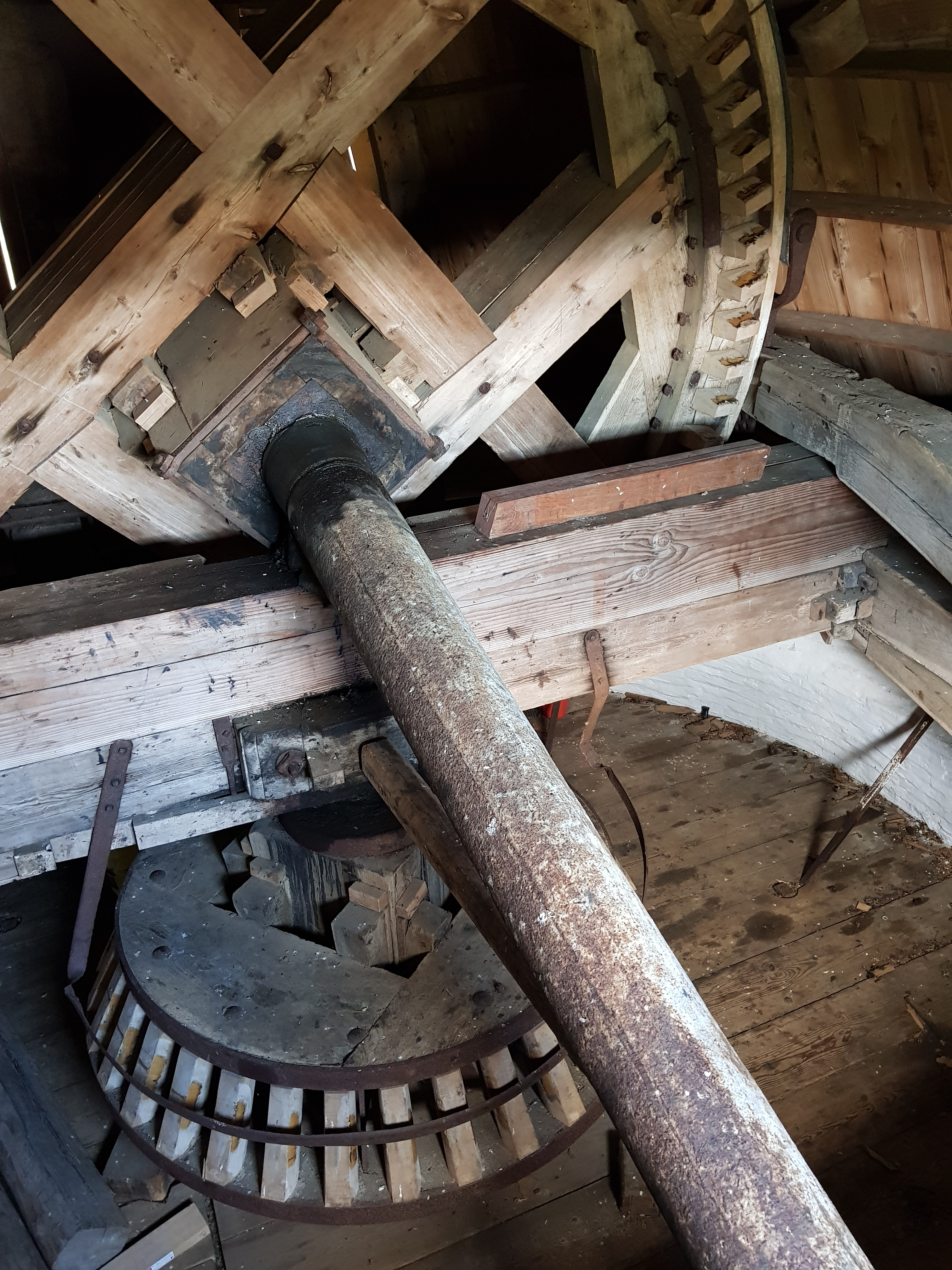 Vingeaksel, krondrev & hathjul